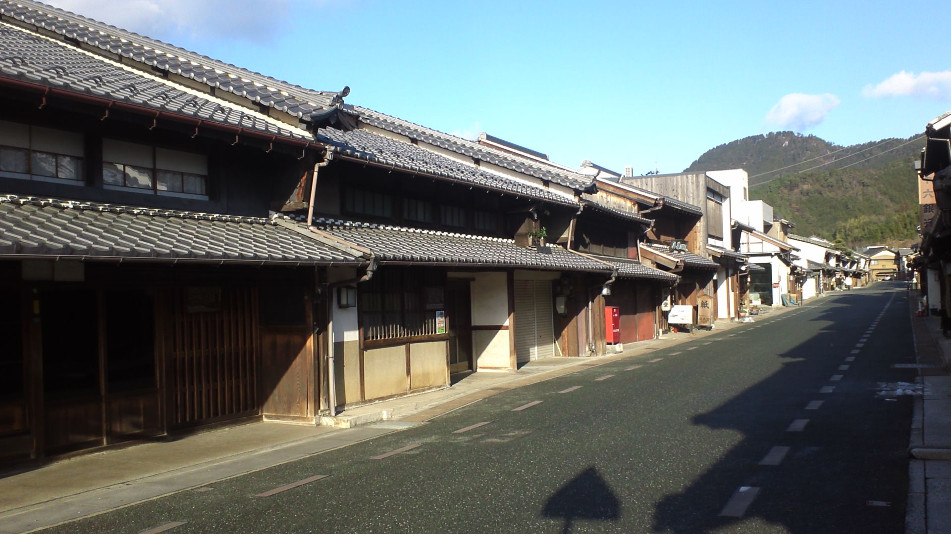 美濃町（岐阜県美濃市）